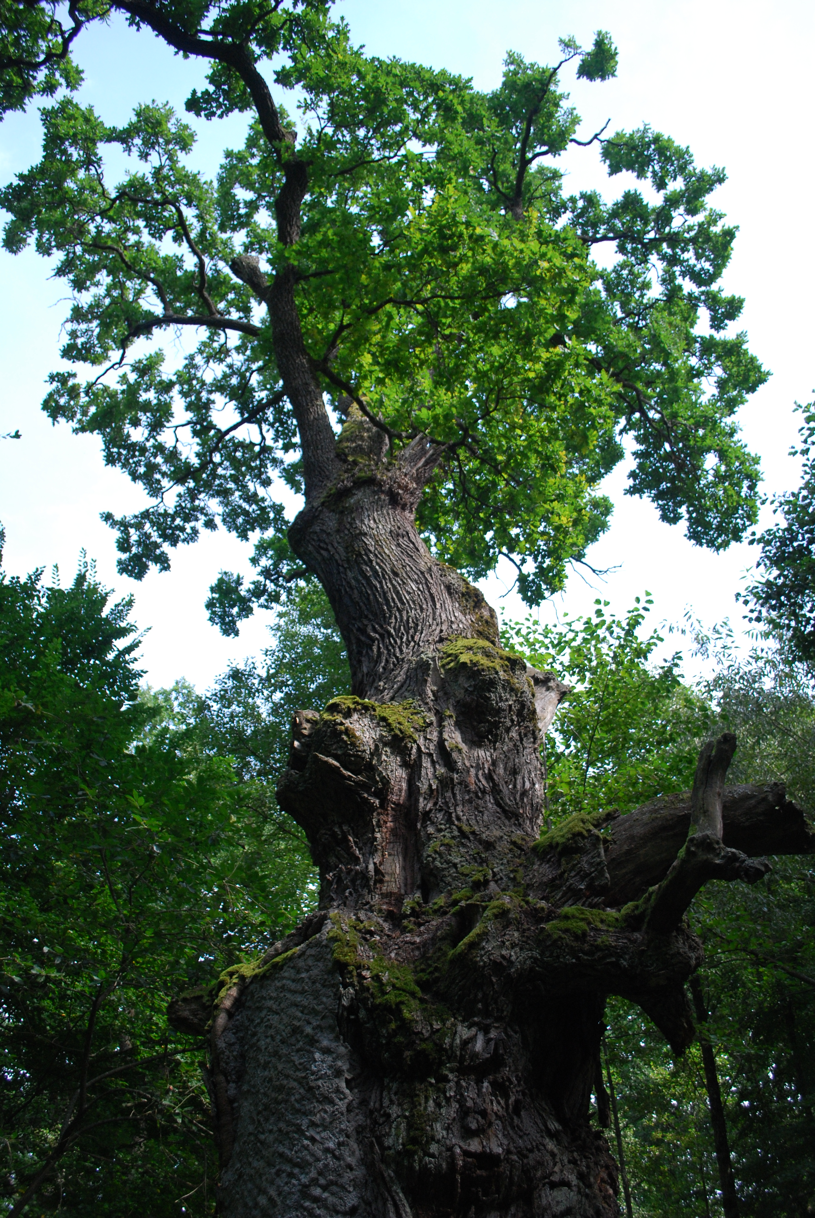 Юзефінська дача, Рокитнівський район Глинівське л-во: кв. 14 (крім вид. 5, 7, 8, 10, 12, 12.1, 13, 14, 33, 35, 36, 63)